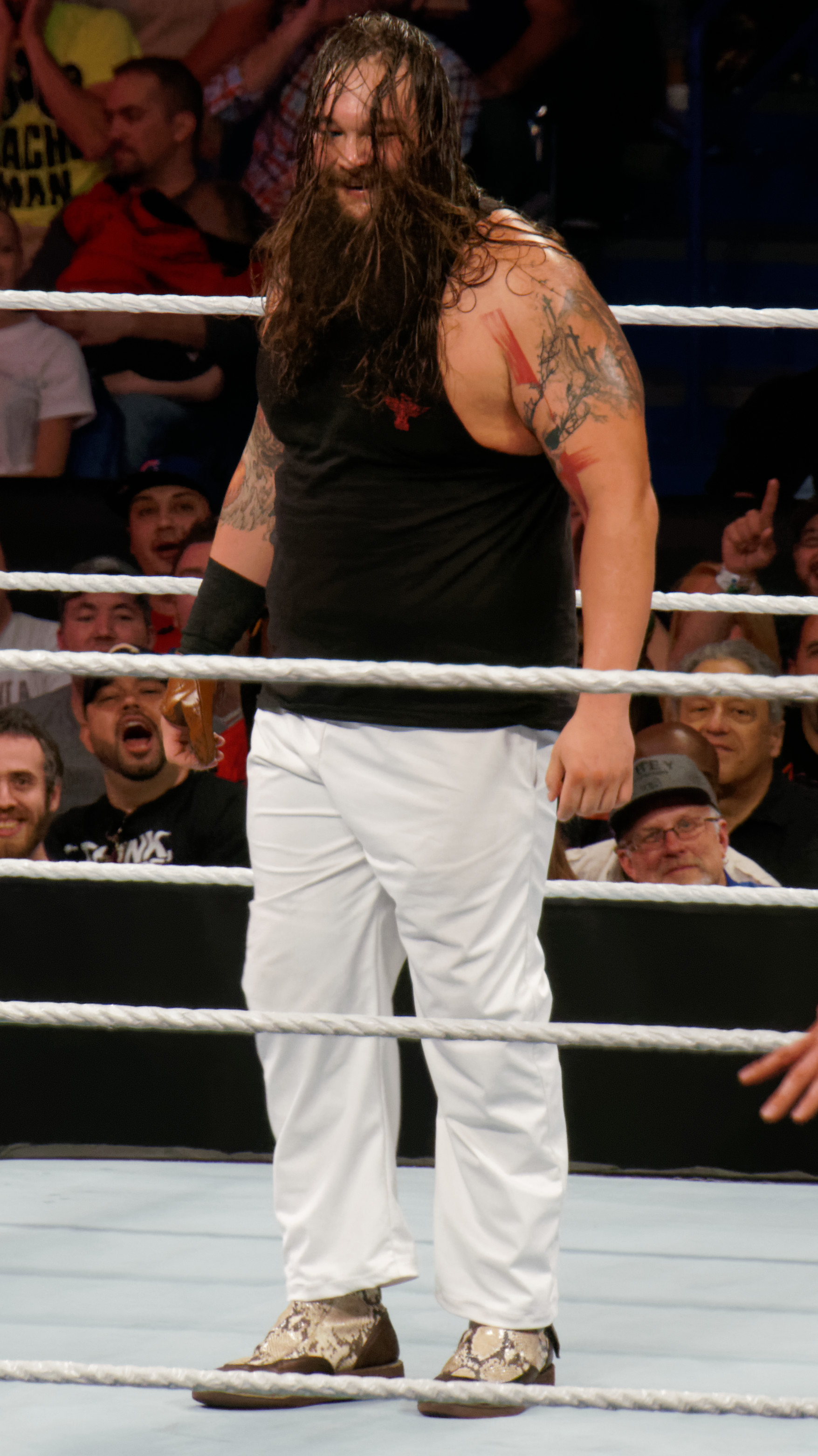 2014-04-07_19-39-15_NEX-6_0990_DxO